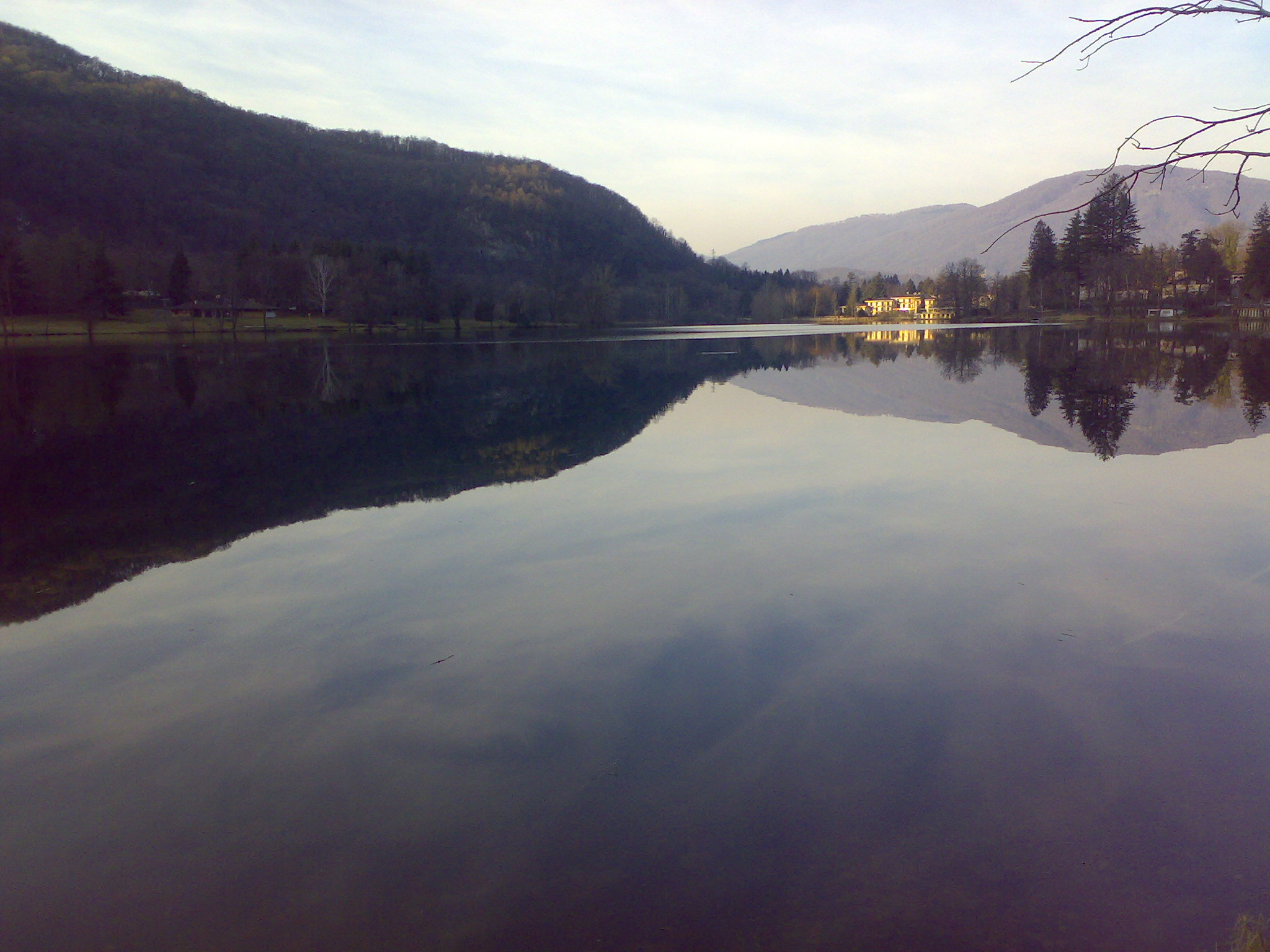 Lago di Ghirla (Provincia di Varese, Italy)